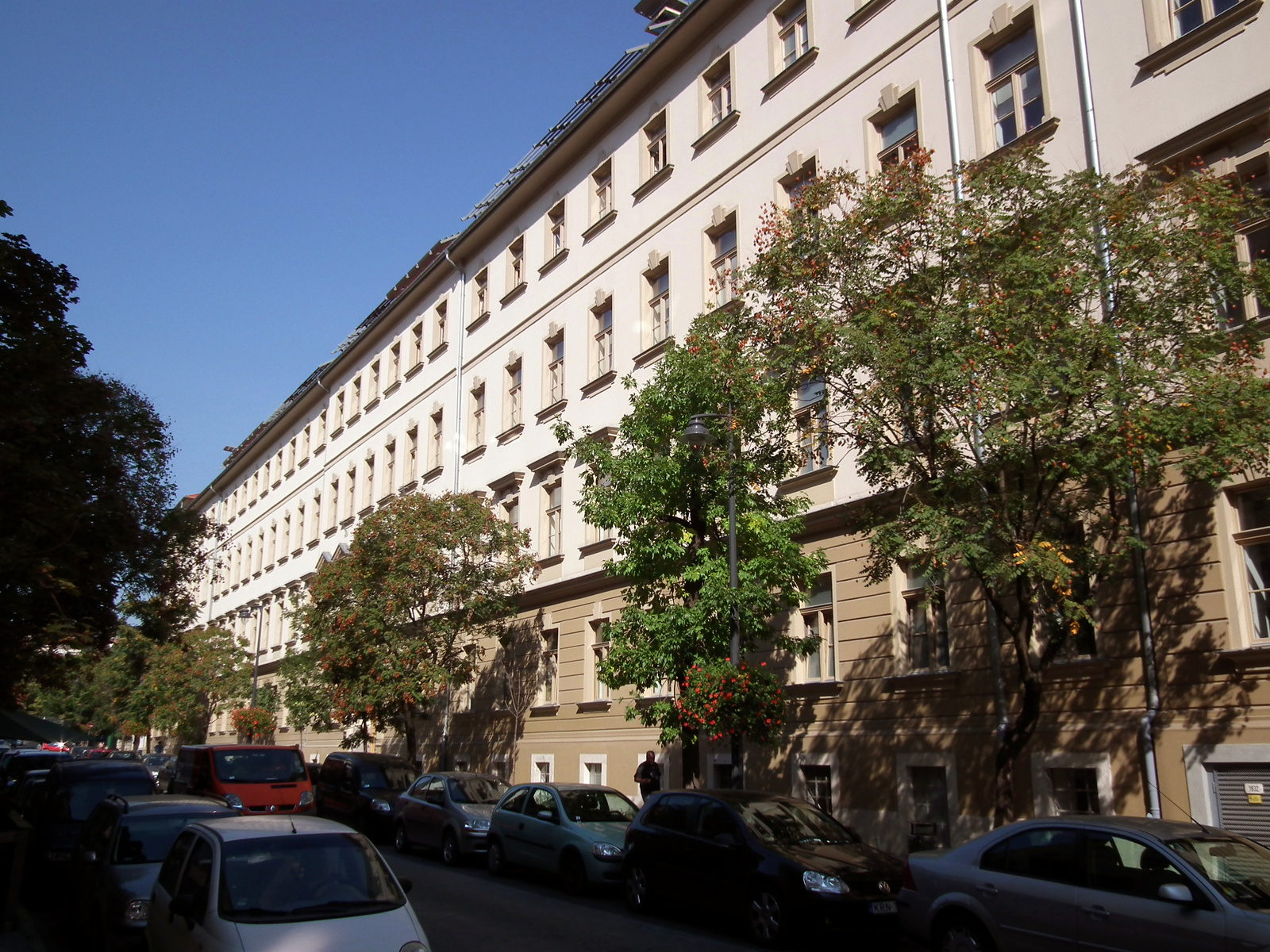 A épület - központi irodaépület Millenáris Park együttes része. (Budapest, II. kerület, Lövőház u. 39., Ezredes u. 15.) This is a photo of a monument in Hungary. Identifier: 18590